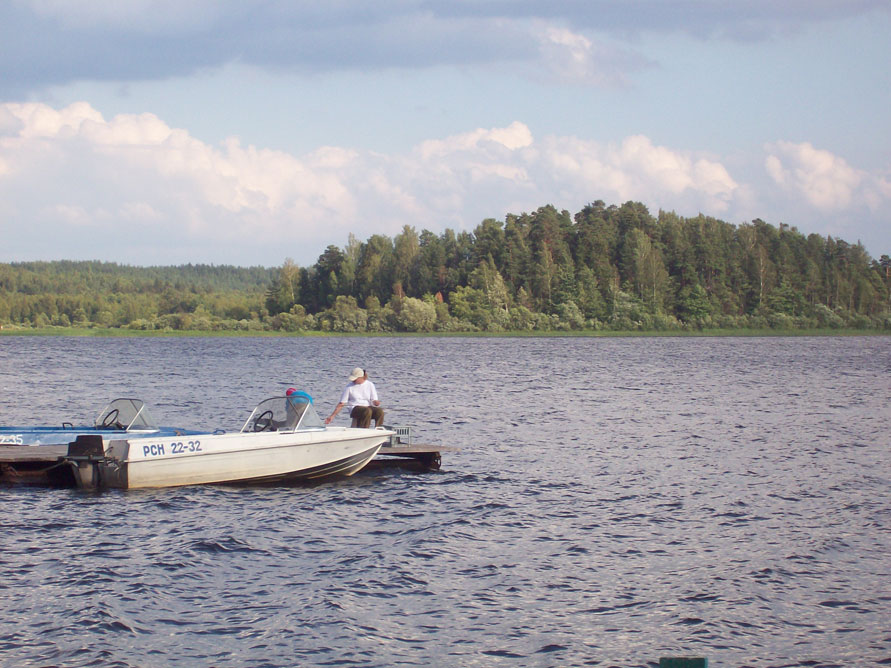 Чернецкий остров